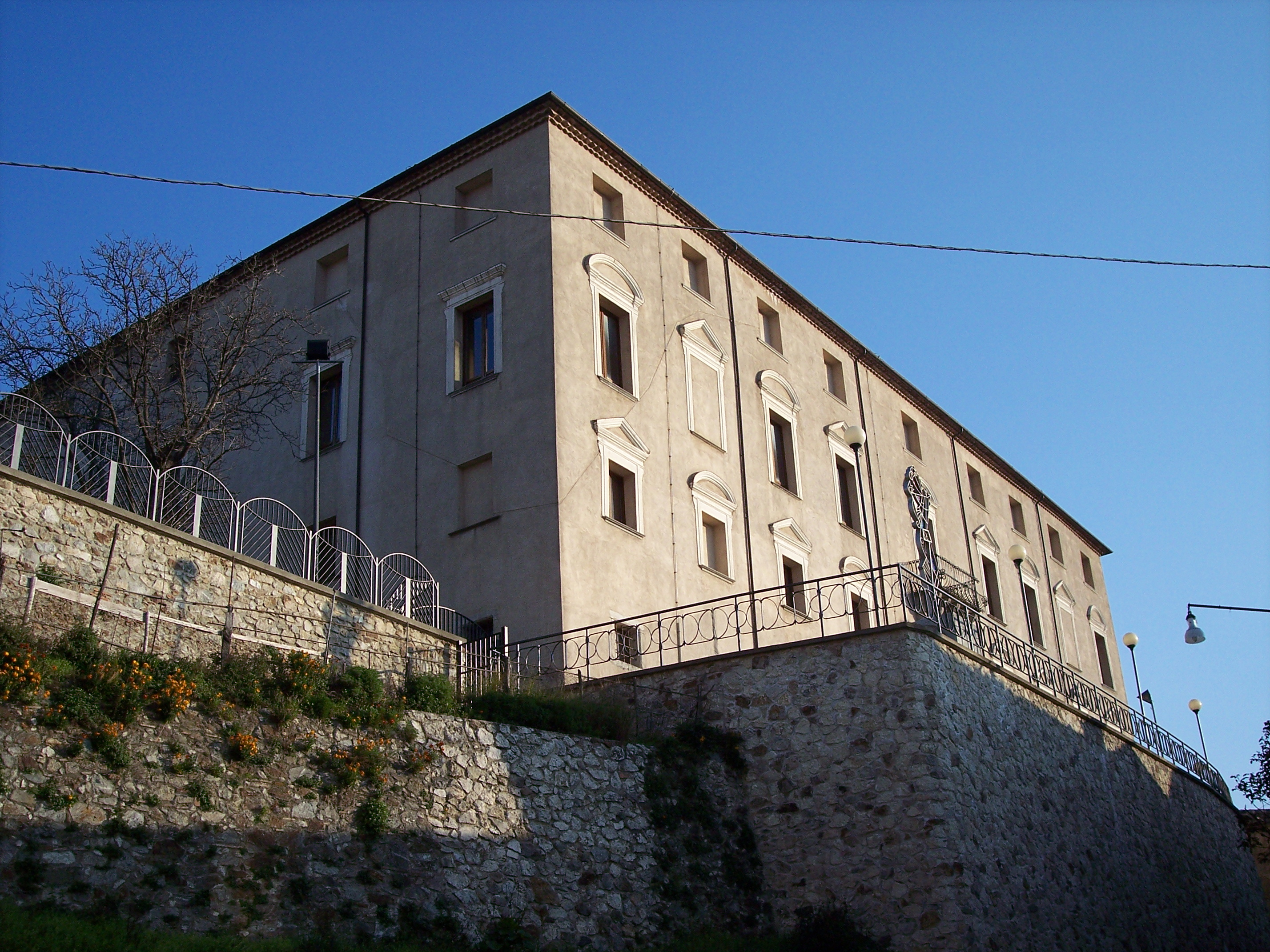 Acri (CS): Palazzo Sanseverino-Falcone, del XVII secolo, appartenuto alla potente famiglia dei principi Sanseverino, veduta della facciata principale. Sono l'autore.